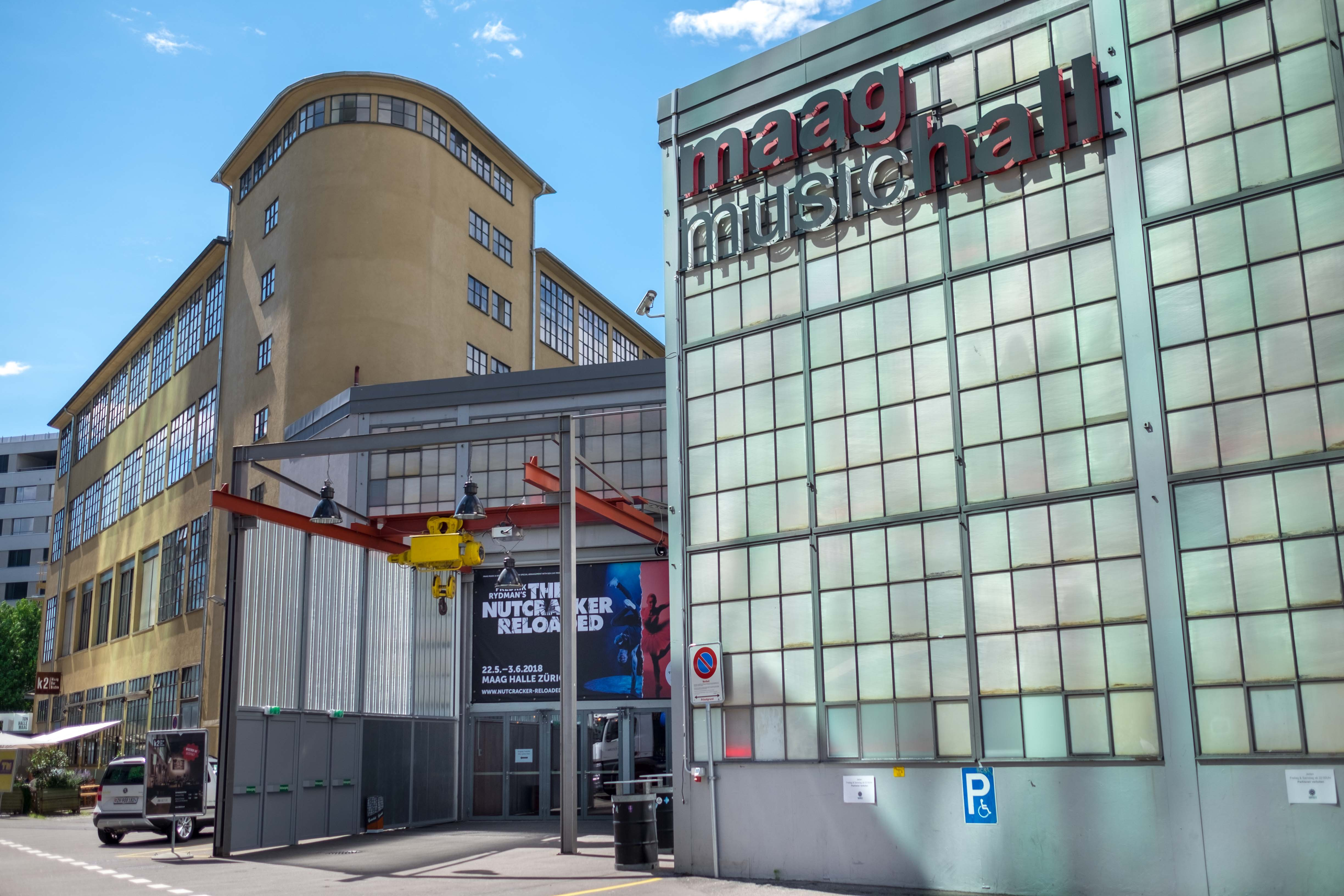 Frontansicht MAAG Halle Zürich Hardbrücke